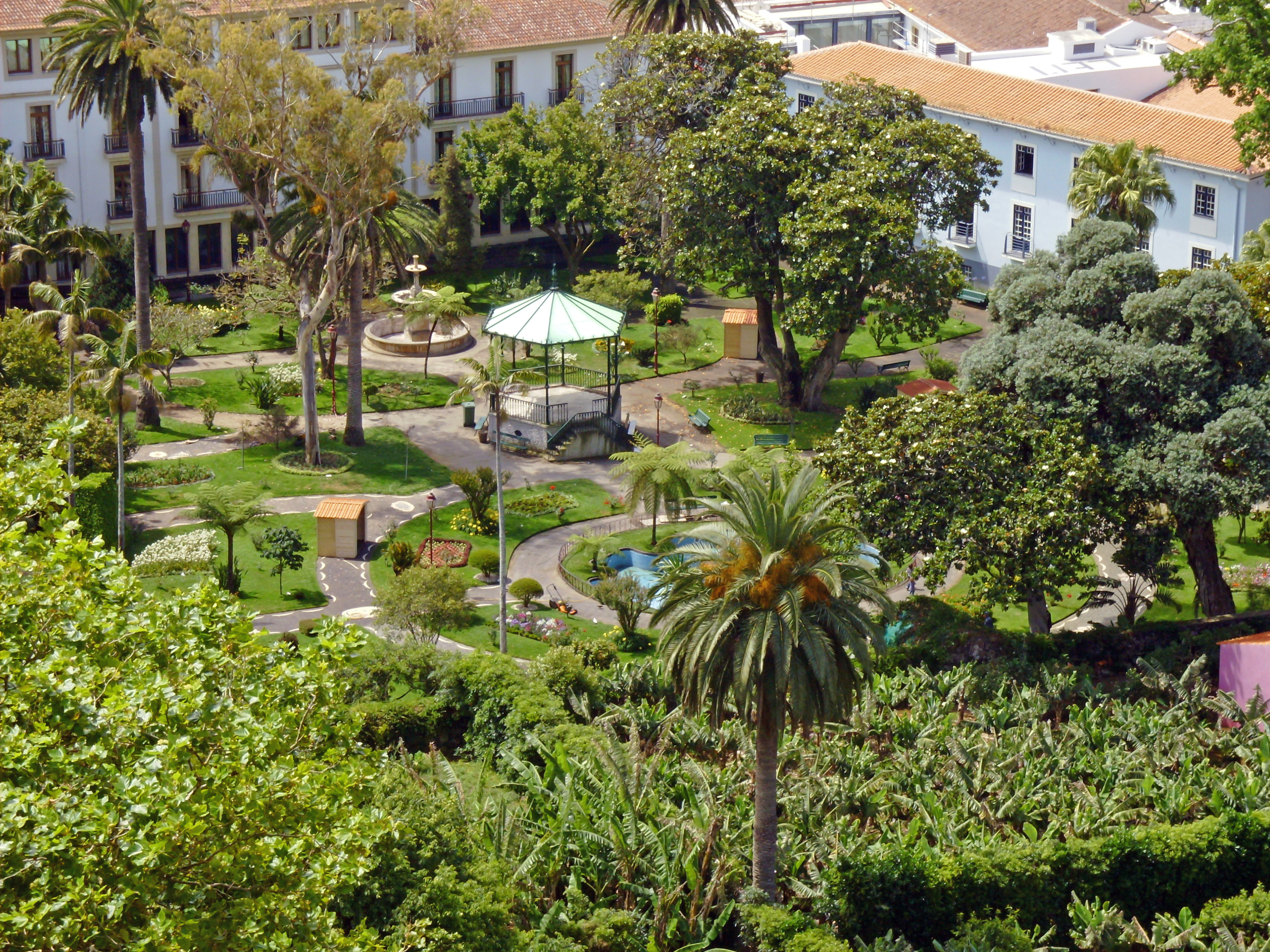 Jardim Duque da Terceira, Angra do Heroísmo, Ilha Terceira, Açores: coreto e chafariz.